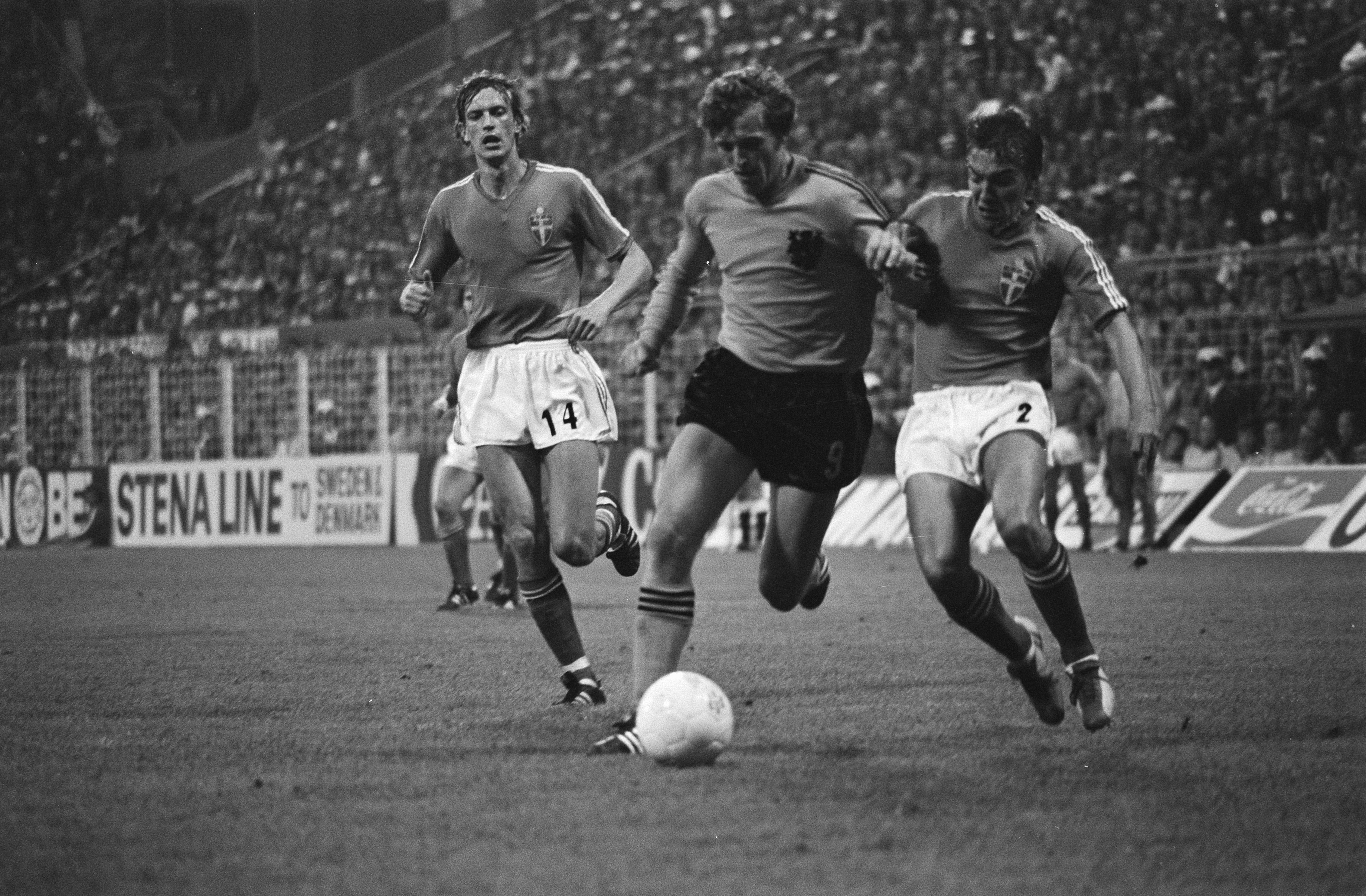 Collectie / Archief : Fotocollectie Anefo Reportage / Serie : [ onbekend ] Beschrijving : WK 74, Nederland tegen Zweden 0-0, v.l.n.r. Tappen, Piet Keizer en Olsson Annotatie : Laatste interland van Piet Keizer Datum : 19 juni 1974 Locatie : Dortmund Trefwoorden : sport, voetbal Persoonsnaam : Keizer, Piet Fotograaf : Mieremet, Rob / Anefo Auteursrechthebbende : Nationaal Archief Materiaalsoort : Negatief (zwart/wit) Nummer archiefinventaris : bekijk toegang 2.24.01.05 Bestanddeelnummer : 927-2679